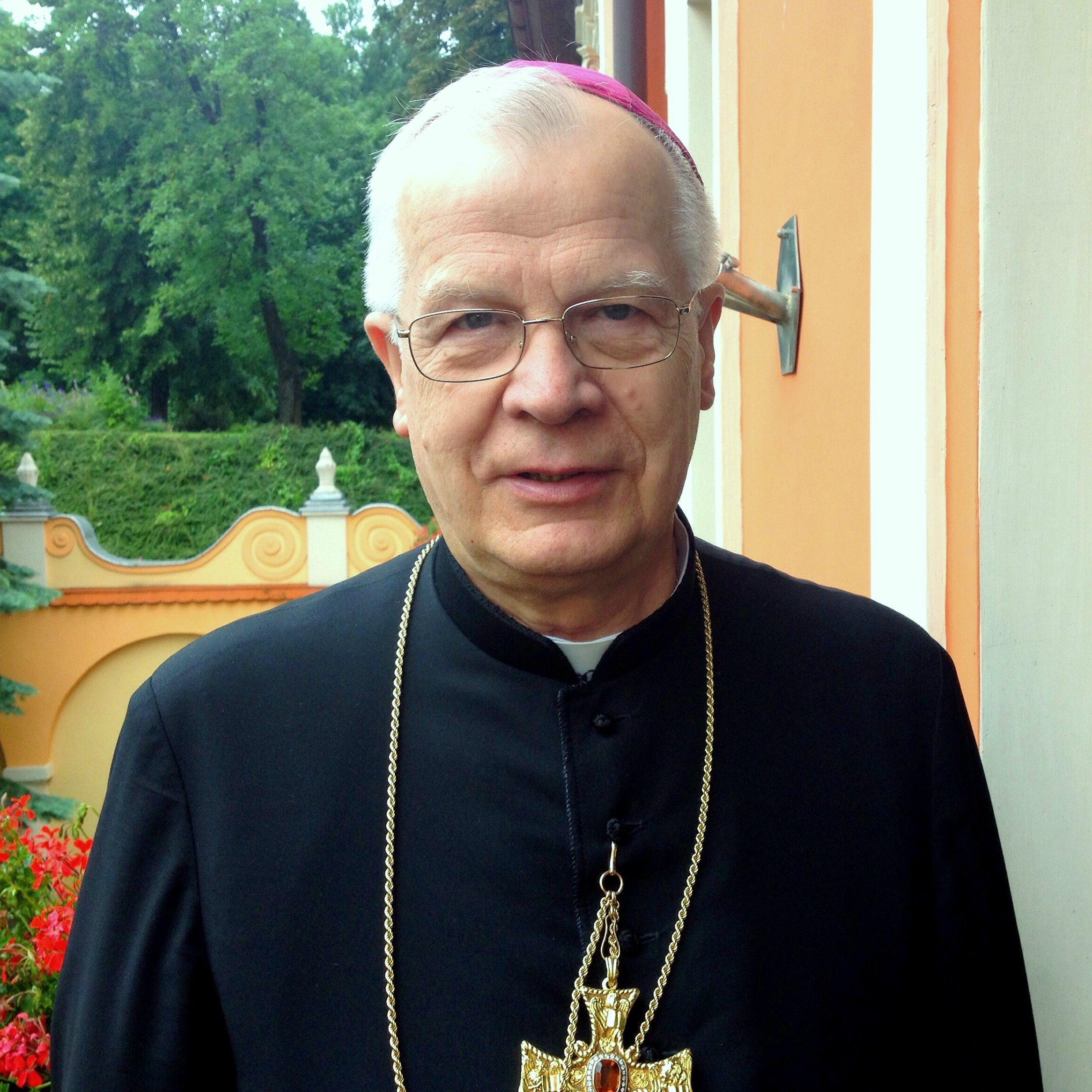 Arcybiskup Józef Michalik.